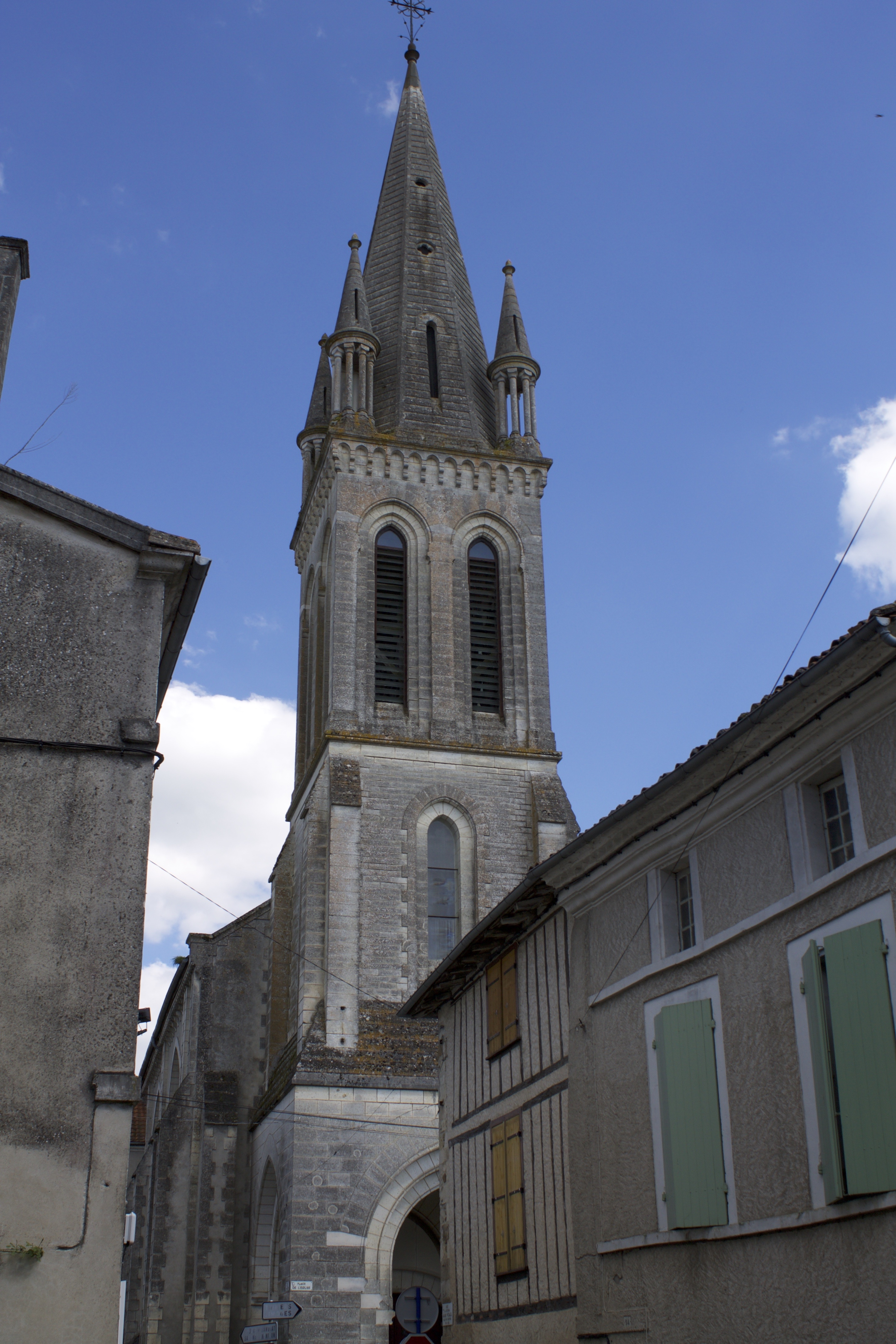 Nontron